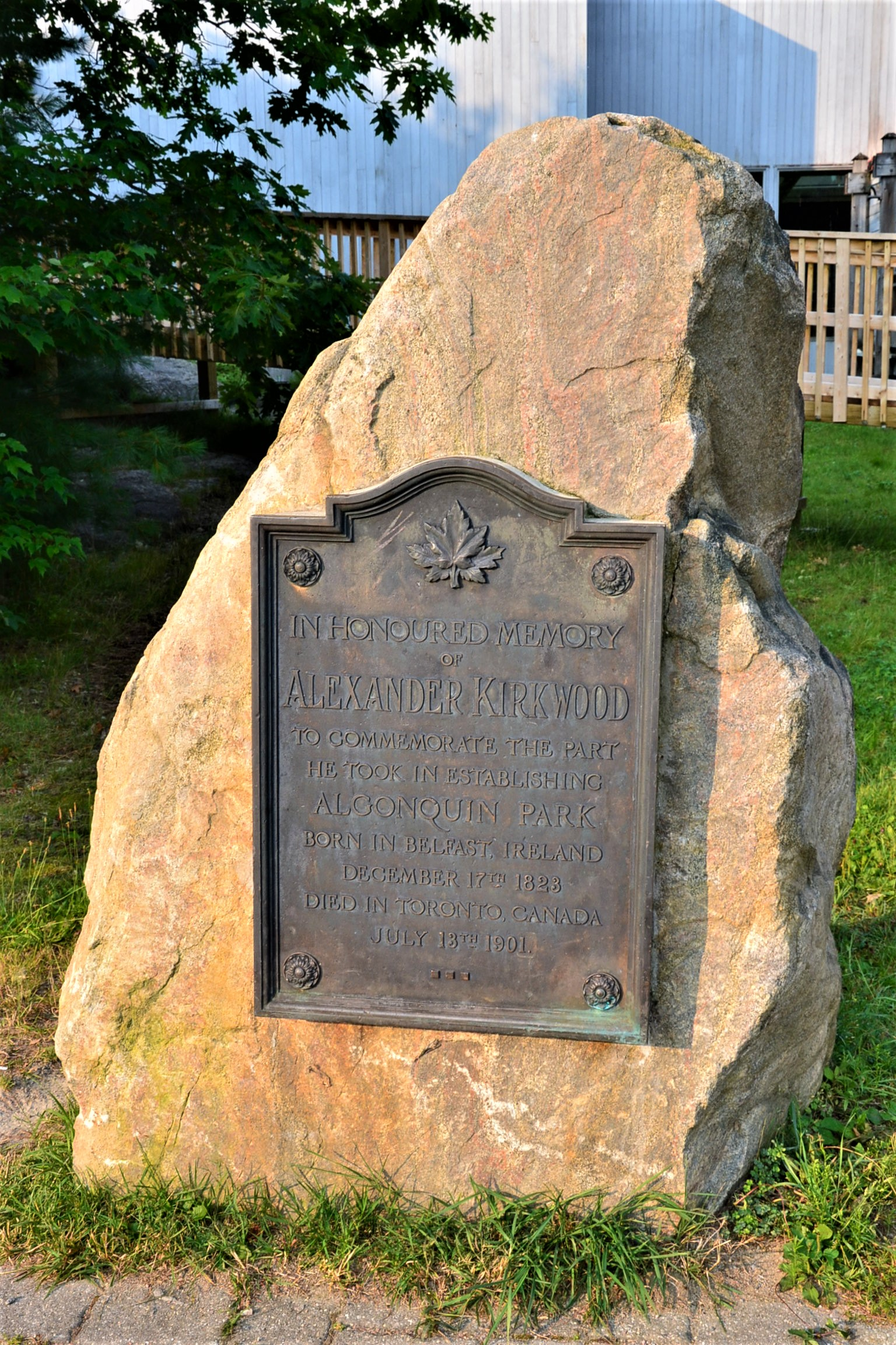 Tablica znajduje się przed budynkiem Visitor Center